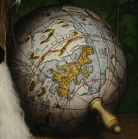 Holbein Ambassadeurs detail globe terrestre